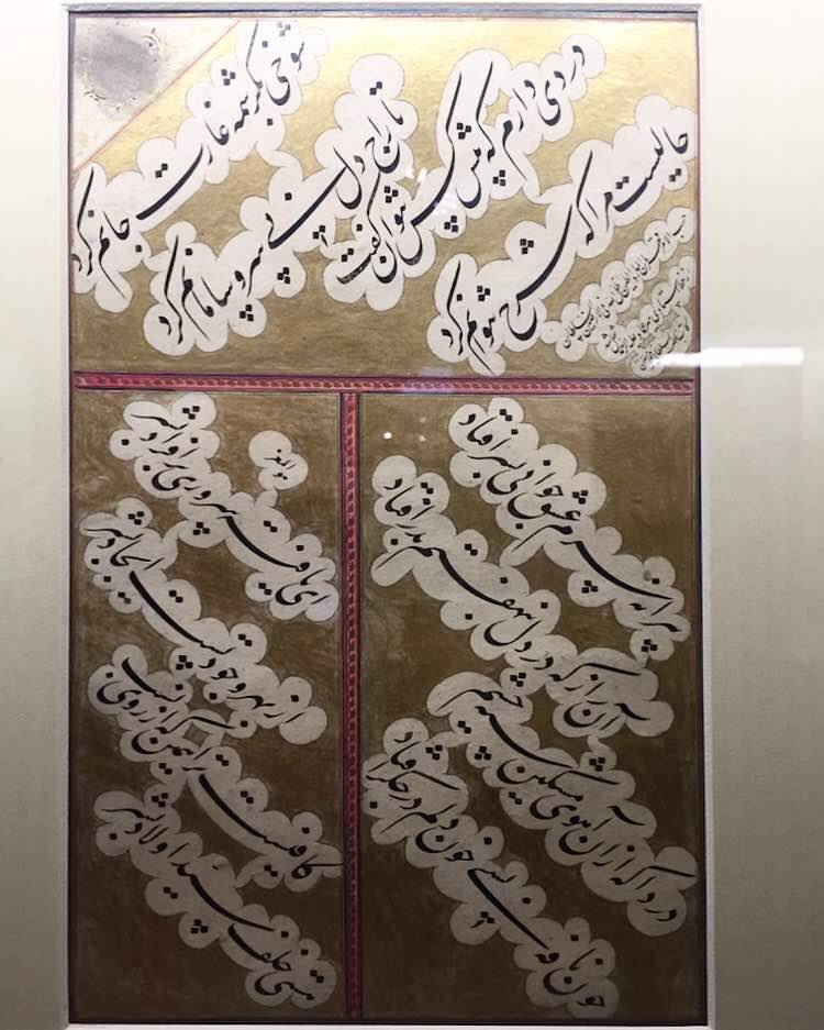 خط محمدحسین